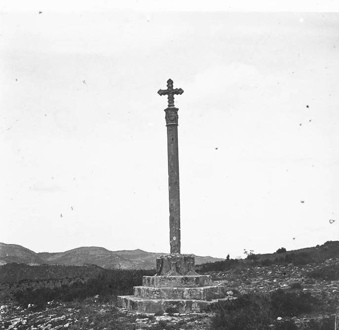 Creu de terme de la Llacuna. Joan Roig i Font (1914)